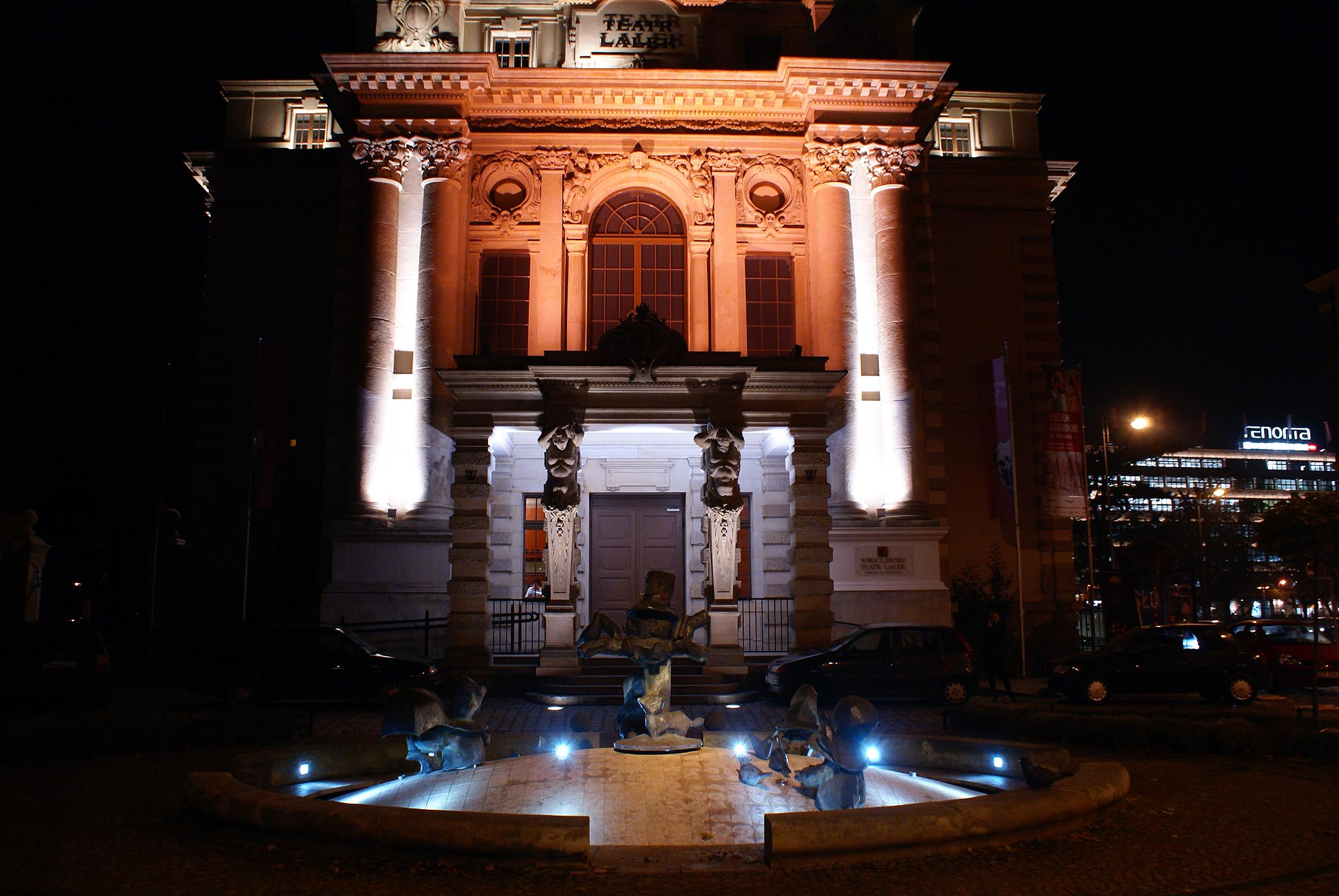 Wrocław, resursa kupiecka, 1892-1909